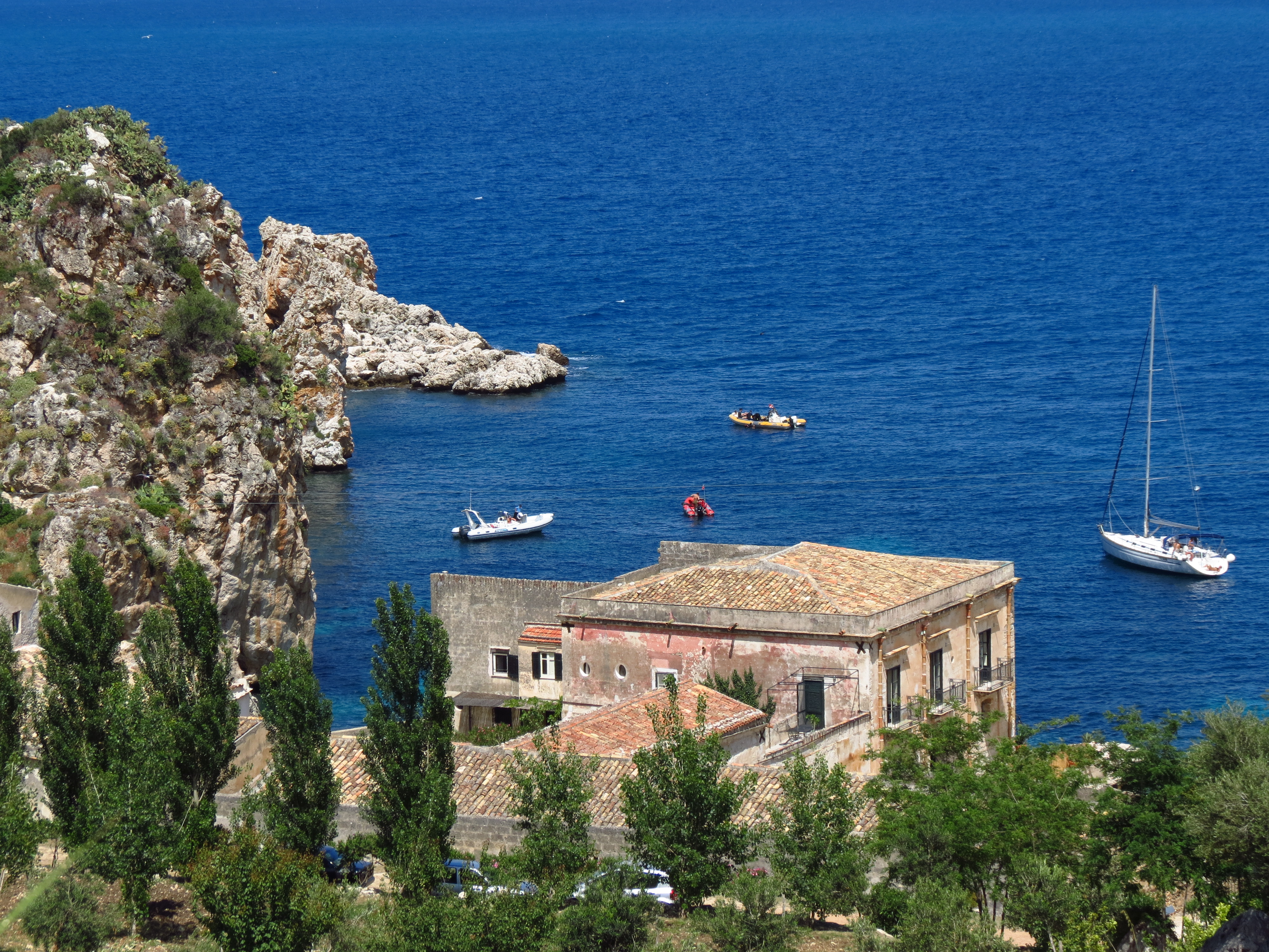 Vue de la Sicile.